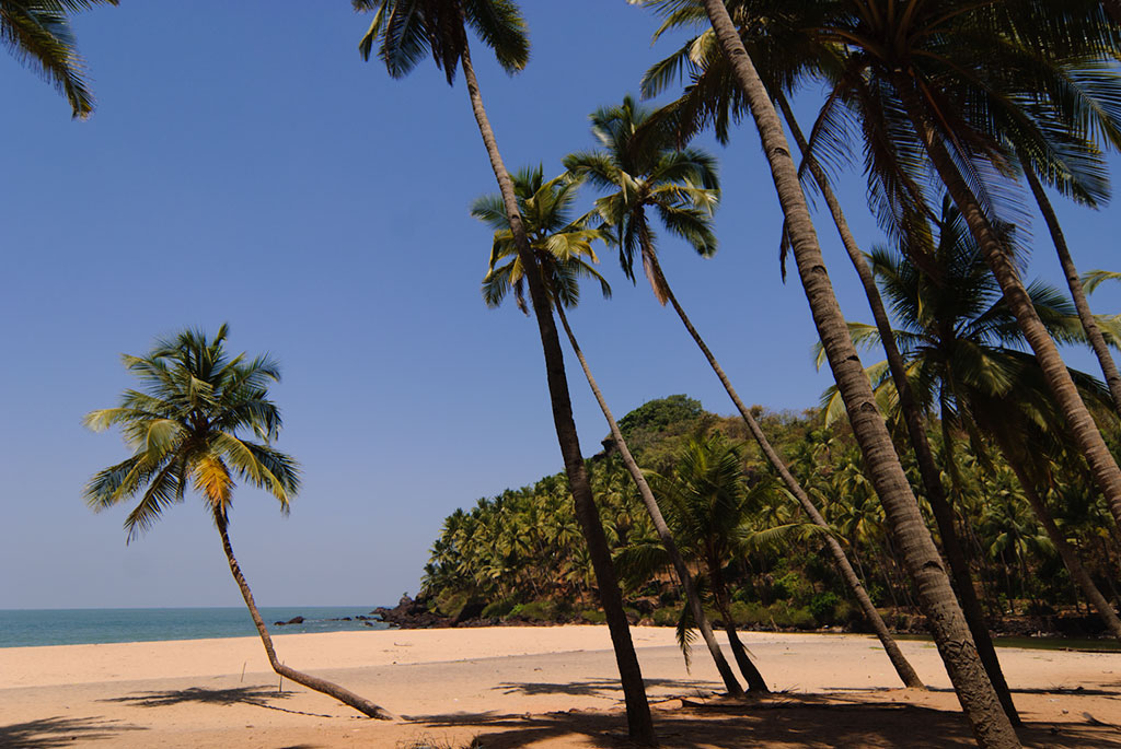 Cabo de Rama beach